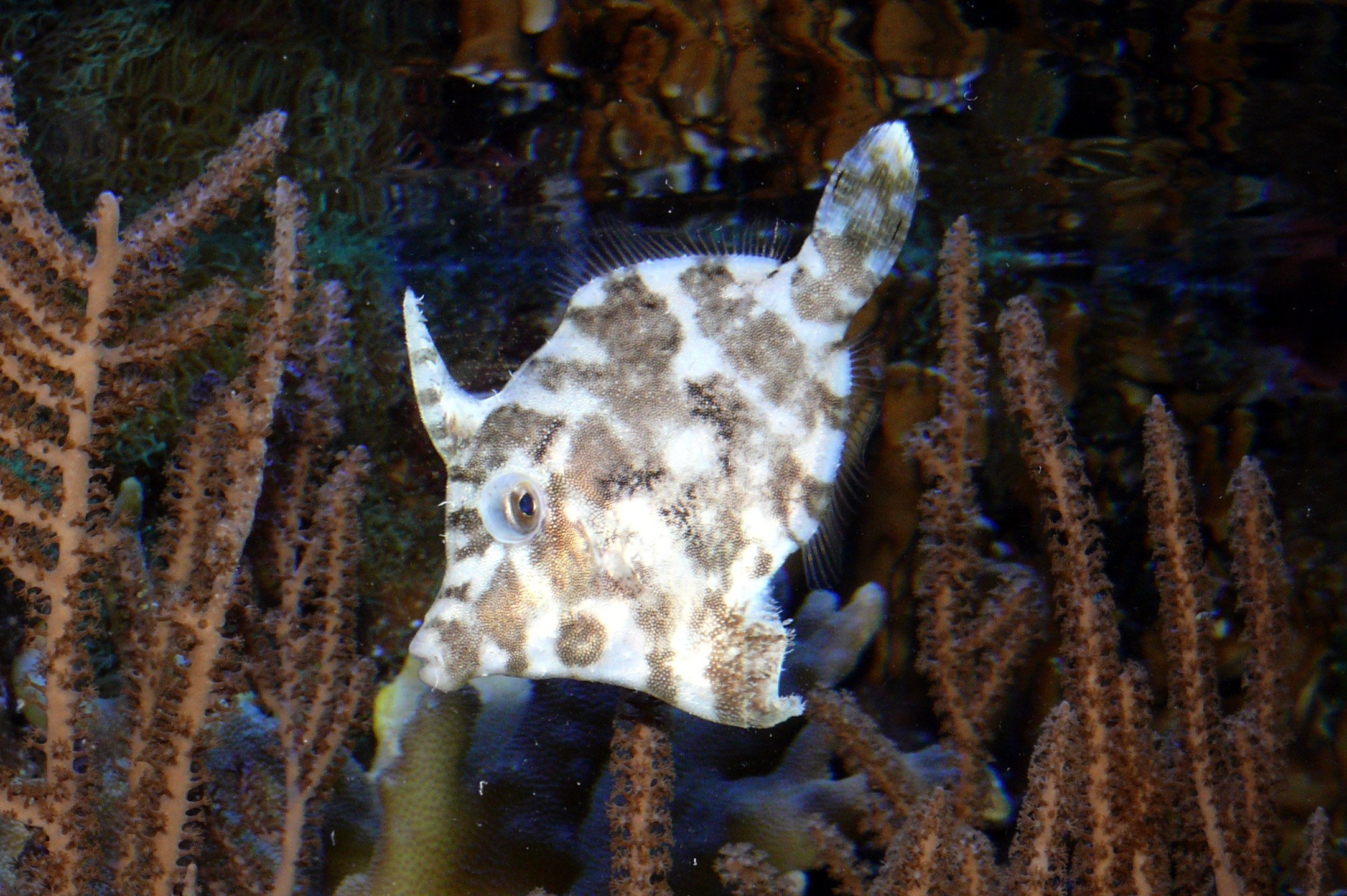 Seegras- oder Tangfeilenfisch (Acreichthys tomentosus)